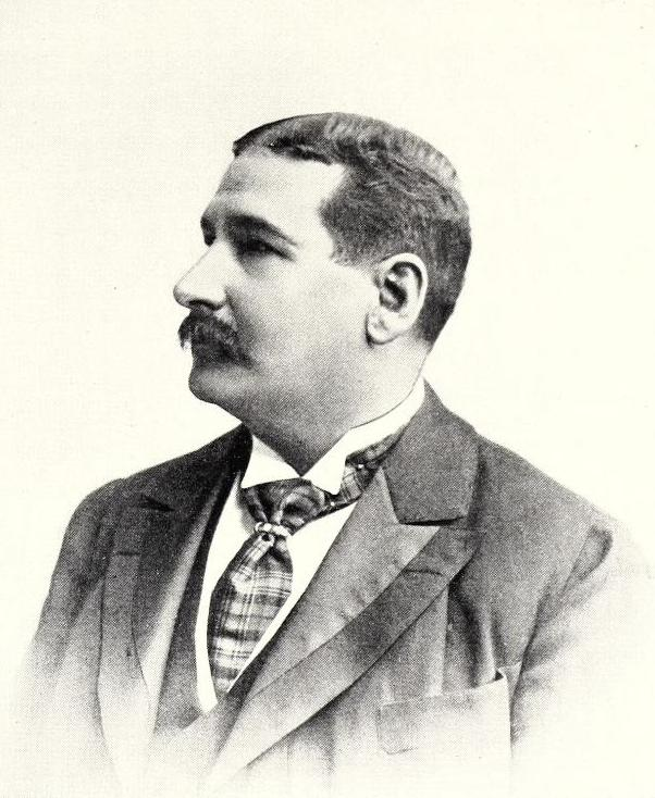 Juan José Francisco Latorre Benavente (Santiago, Chile, 24 de marzo de 1846 - Viña del Mar, Chile, 9 de julio de 1912). Marino chileno, uno de los principales actores de la Guerra del Pacífico, vencedor del Combate Naval de Angamos.